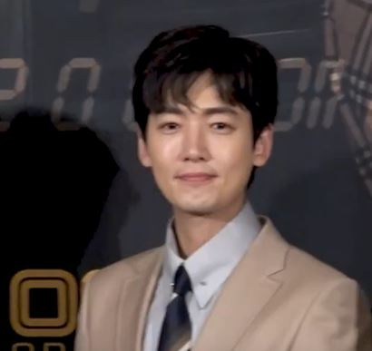 [제작발표회] 웃음 가득했던 '라온마' 포토타임